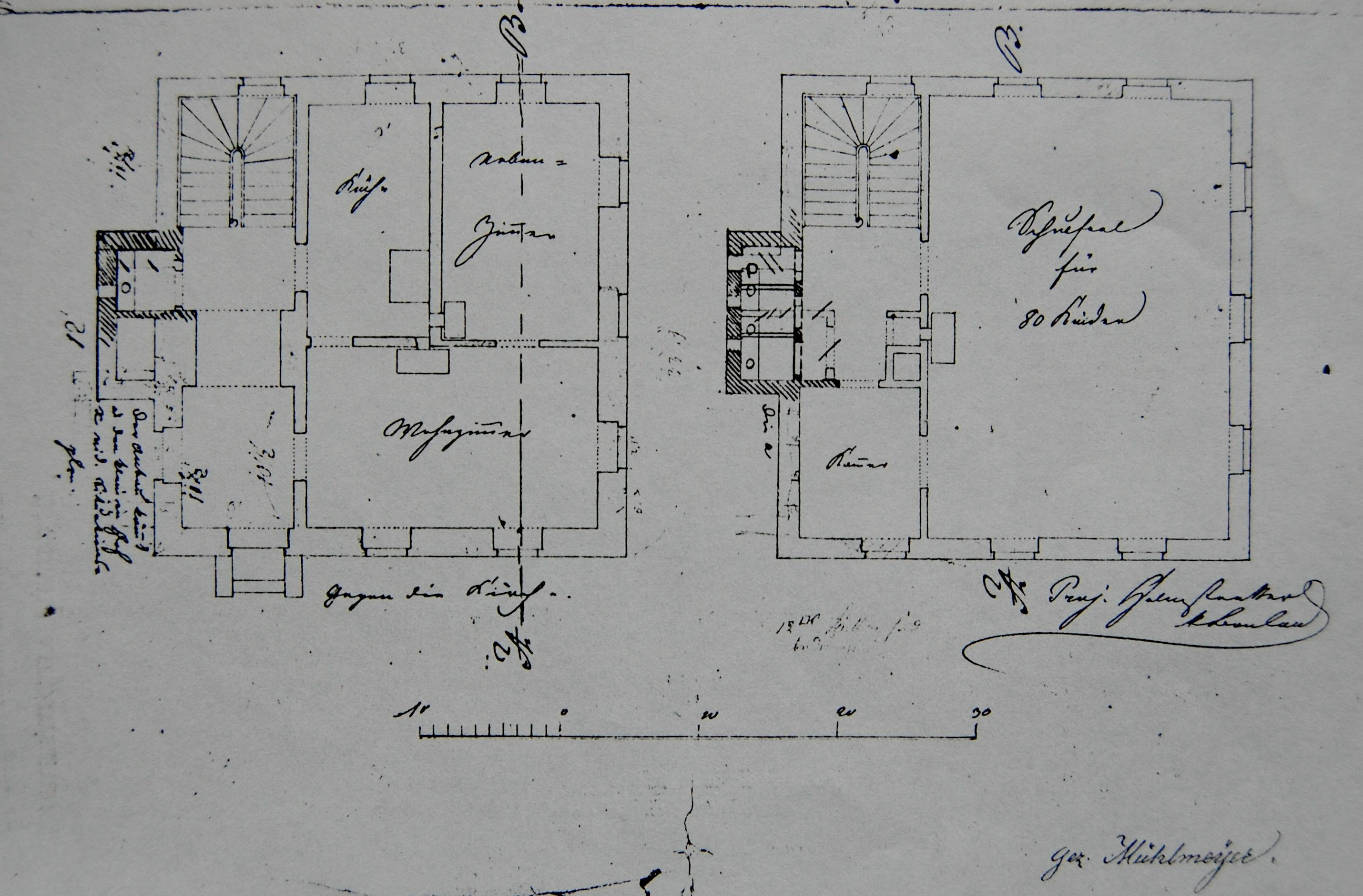 "Plan über ein neu zu erbauendes Schulhaus in Gleiritsch, Königliches Landgericht Nabburg" aus dem Jahre 1839